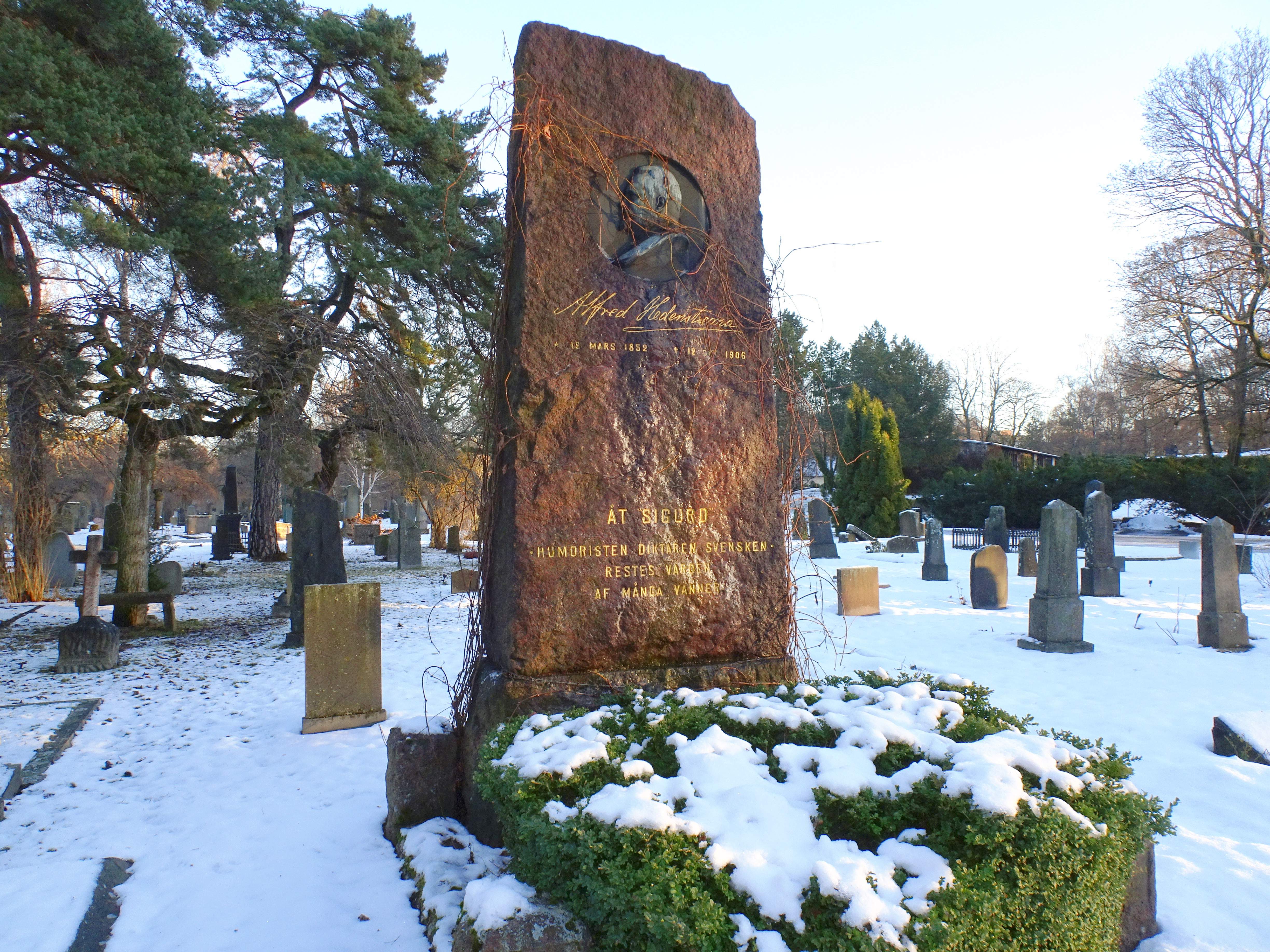 Alfred "Sigurd" Hedenstiernas gravvård på Norra begravningsplatsen i Solna. Konstnär Johan Axel Wetterlund. Verket avtäcktes 17 oktober 1909